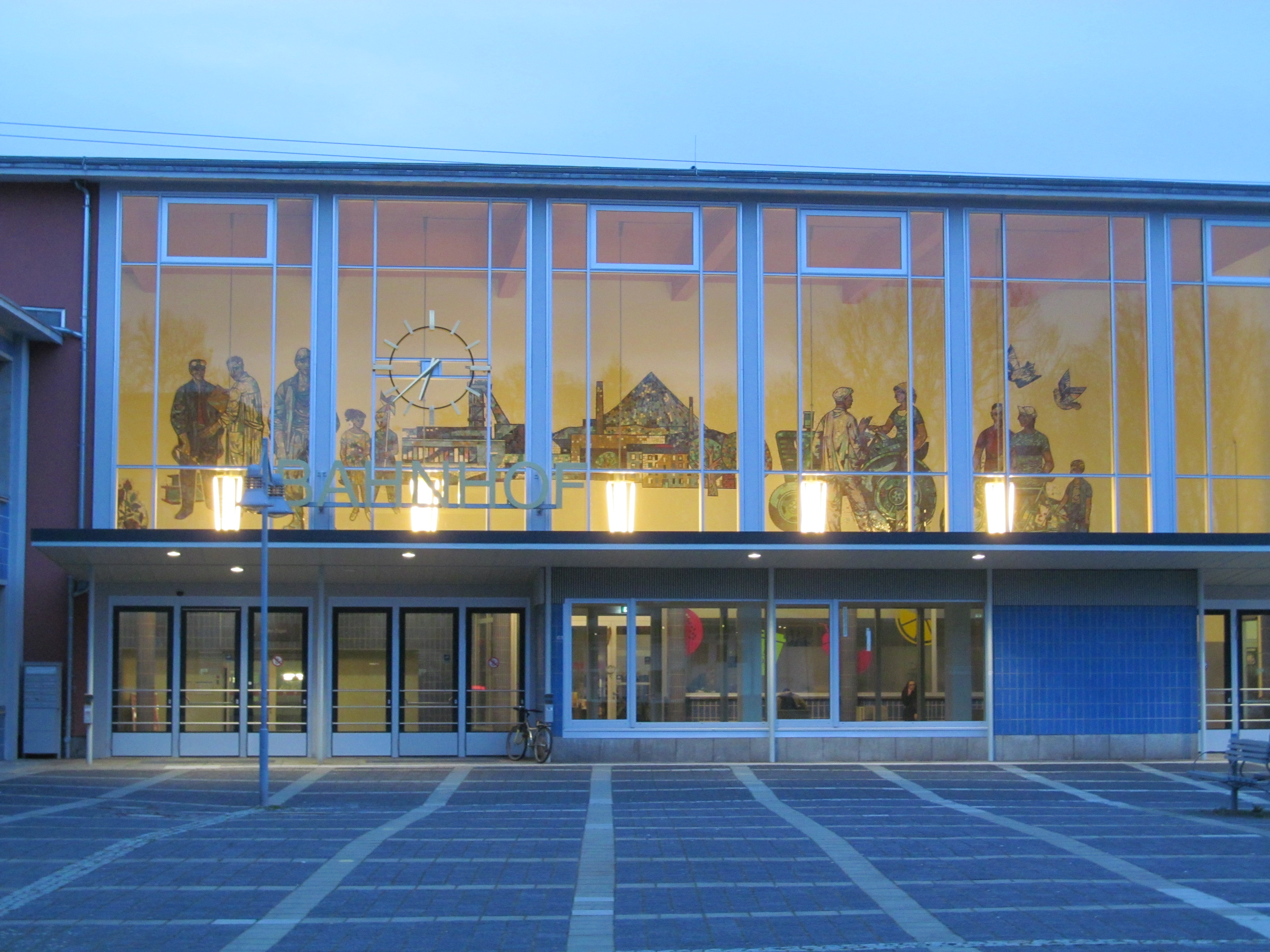 Wandmosaik in der Bahnhofshalle von Sangerhausen